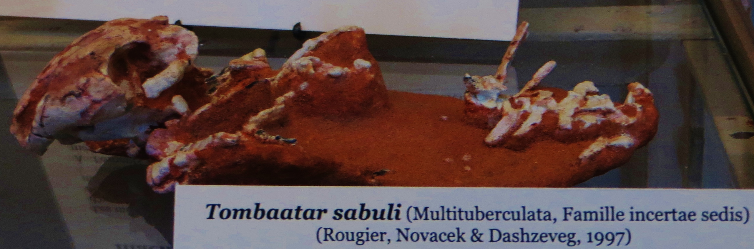 Fossil of Tombaatar, an extinct mammal - Took the photo at Musee d'Histoire Naturelle, Paris